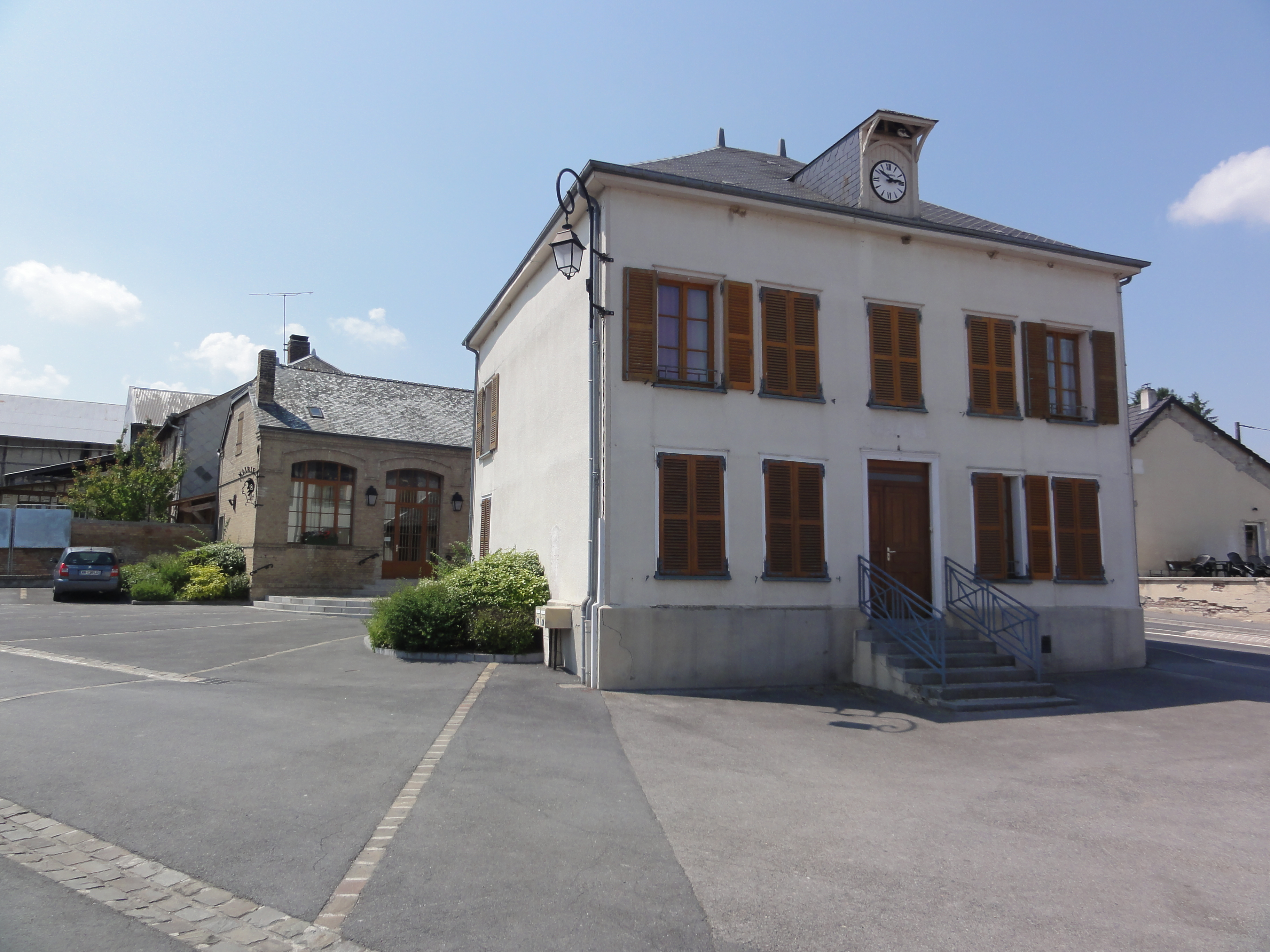 Condé-lès-Herpy (Ardennes) Mairie